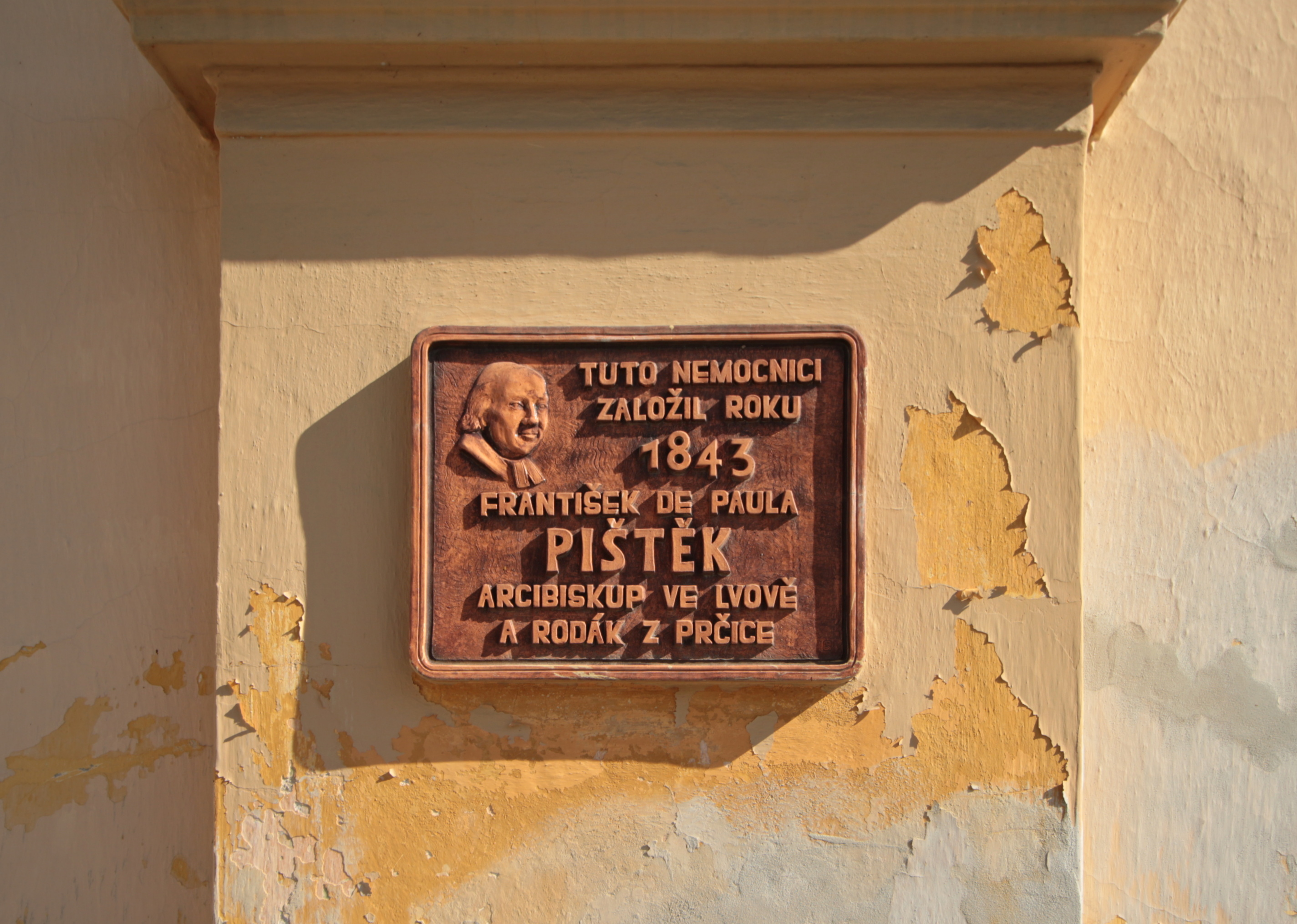 Sedlec-Prčice, špitál v Prčici, pamětní deska Františka de Pauly Pištěka